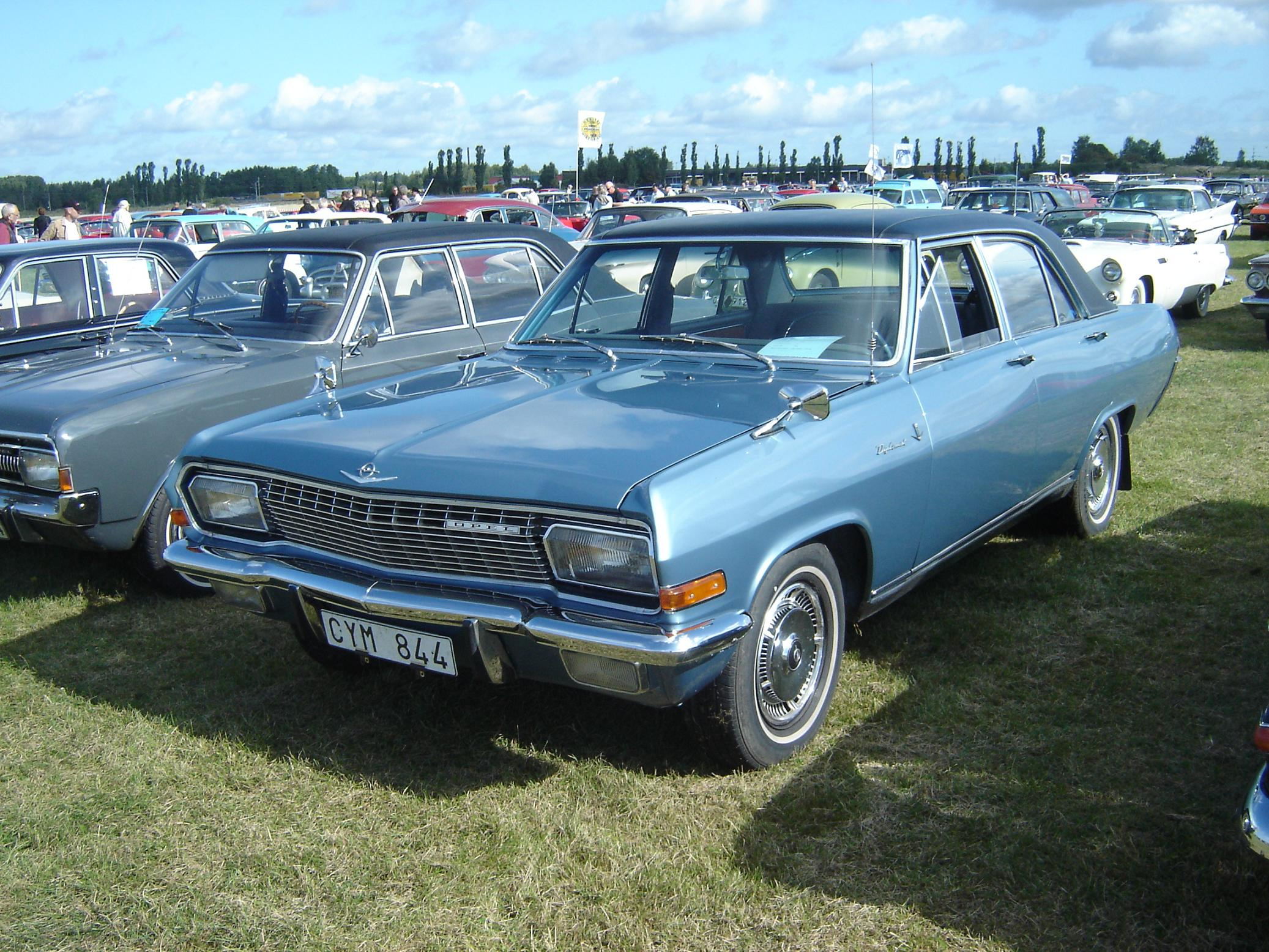 Opel Diplomat V8